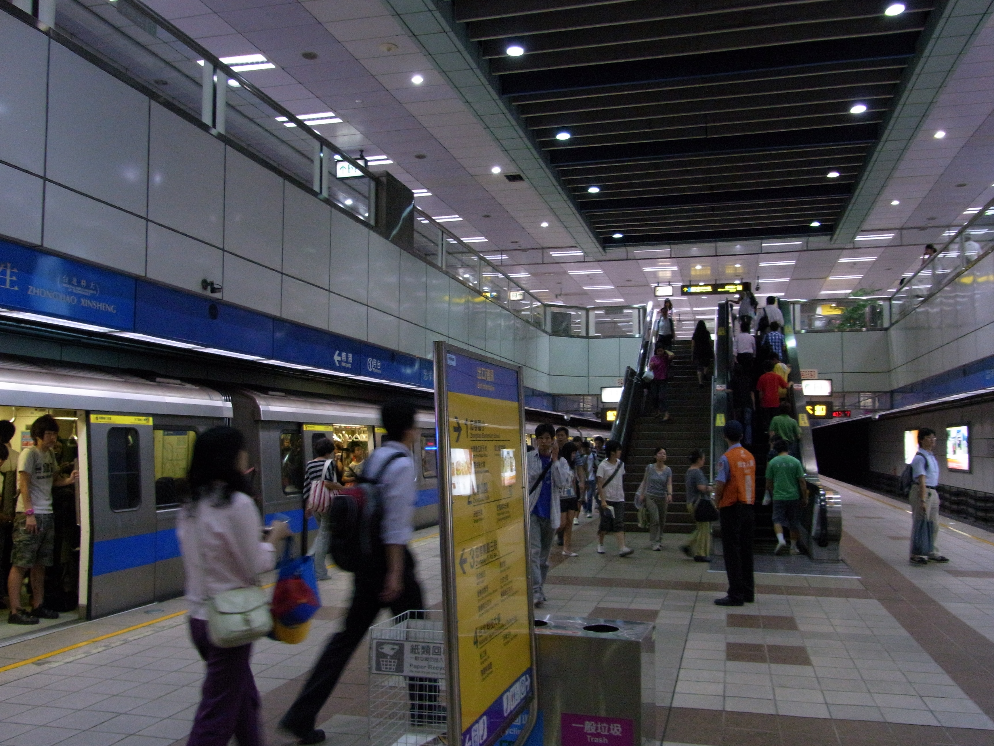 中文（台灣）: 台北捷運忠孝新生站第一月台。